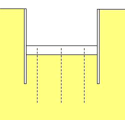 Plaatje van een bouwkuip met trekpalen, getekend door Wikipediagebruiker: GeeKaa 24 aug 2005 09:31 (CEST)